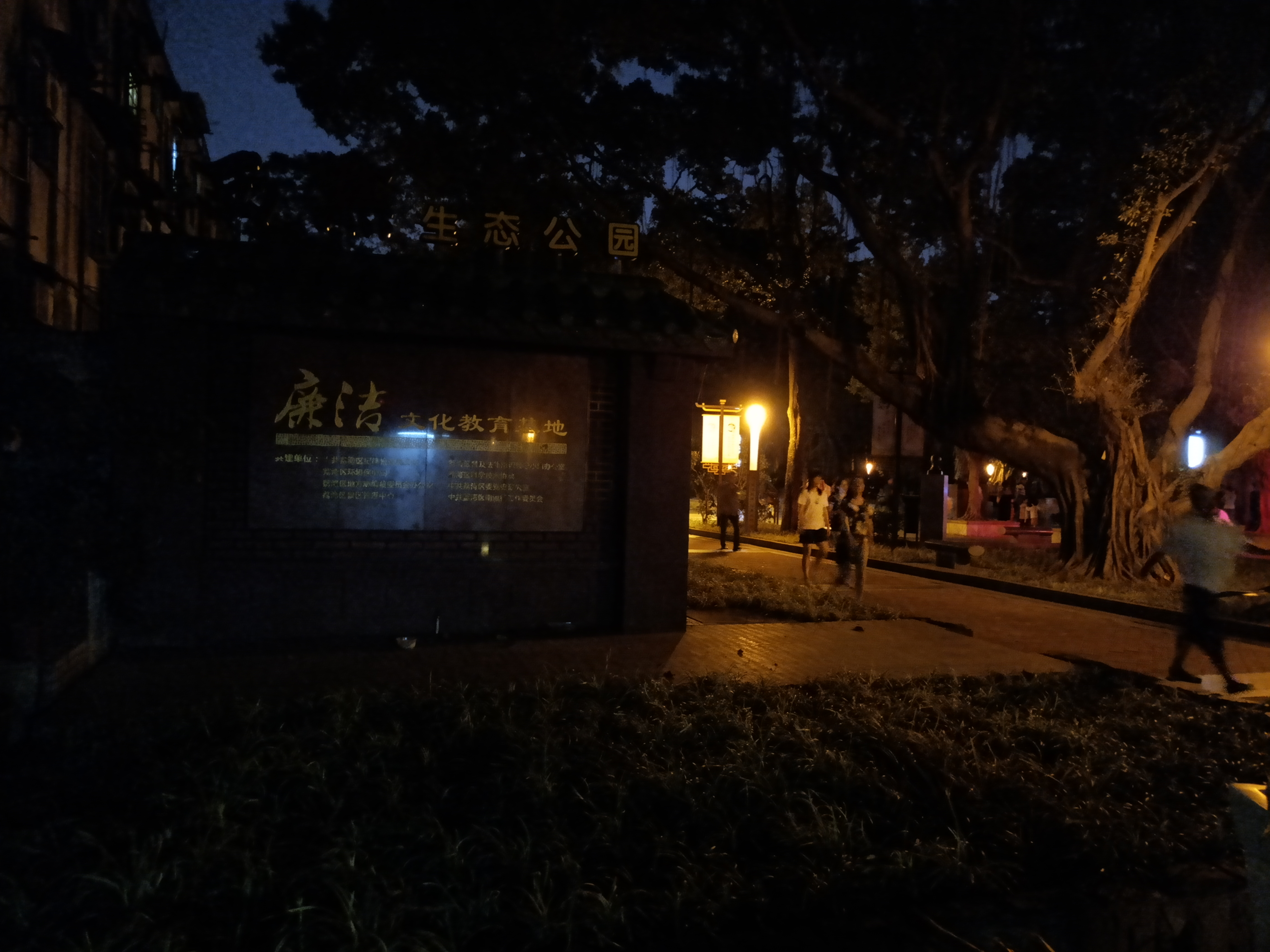 粵語: 西焦生態公園